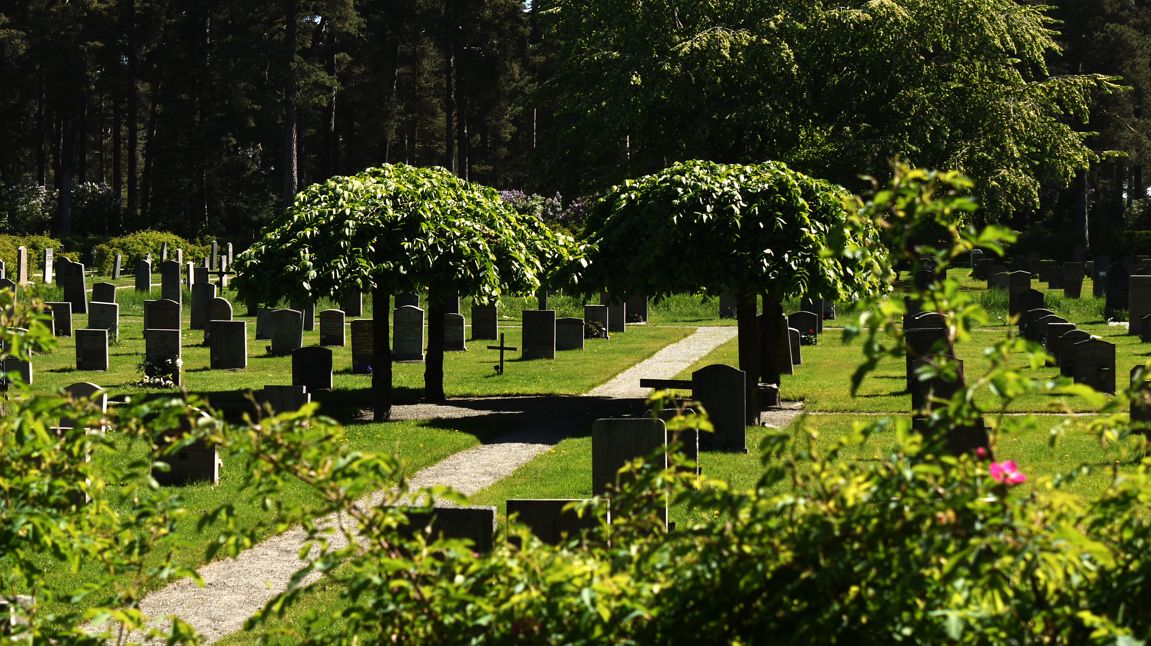 Gravkvarter i Skogskyrkogårdens södra del. Stockholm